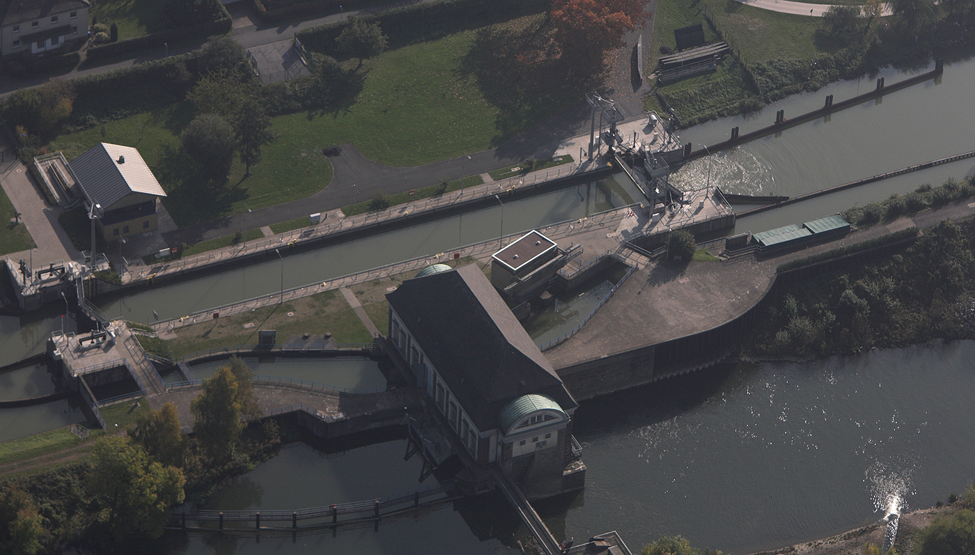 Luftbildaufnahme der Schleuse Hamm mit Wasserübergabe zwischen Lippe und Datteln-Hamm-Kanal